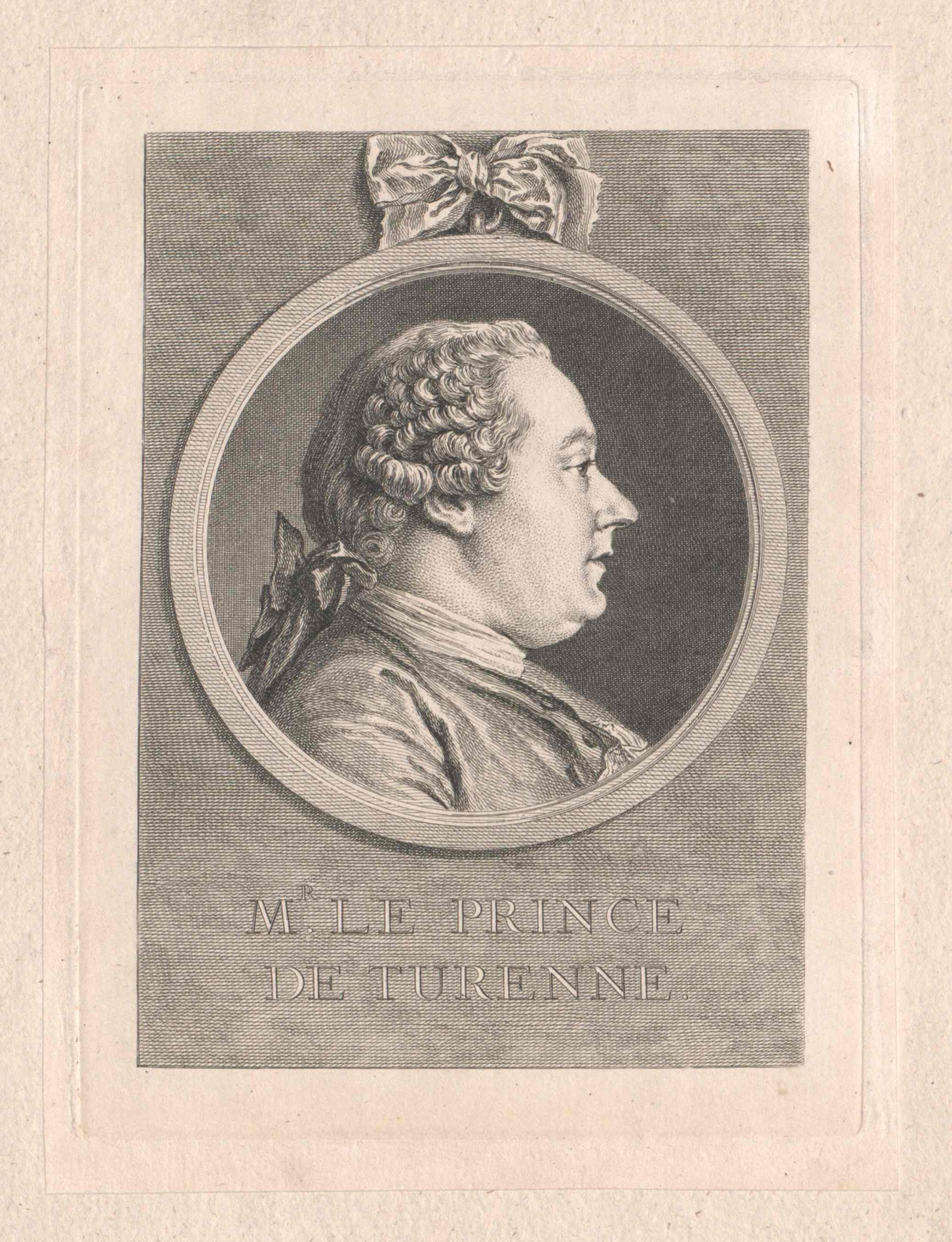 Jacques Léopold Charles Godefroy de La Tour d'Auvergne, Duc de Bouillon